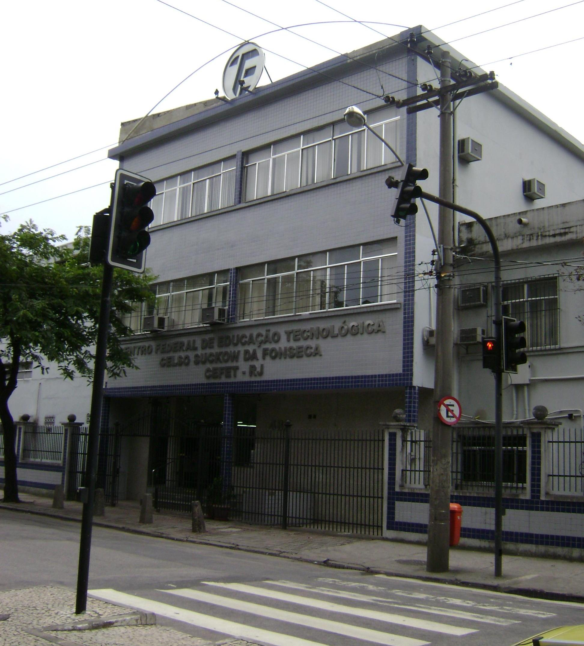 lamartine de freitas